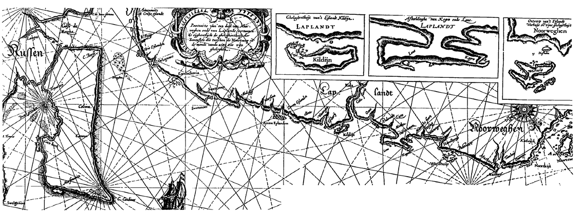 Лука Вагенер. Морская карта части Норвегии и Лапландии (1612)